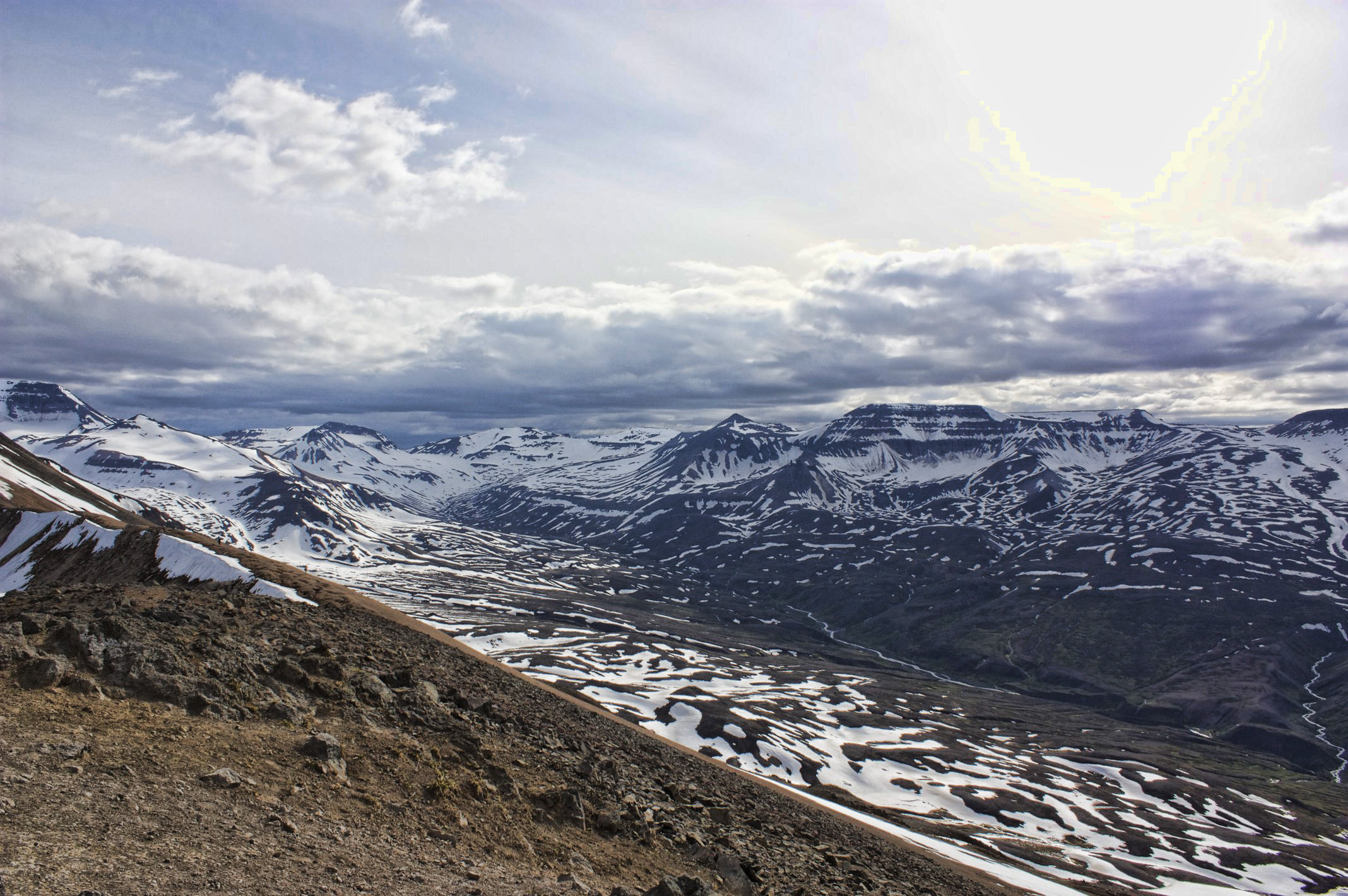 Glerárdalur